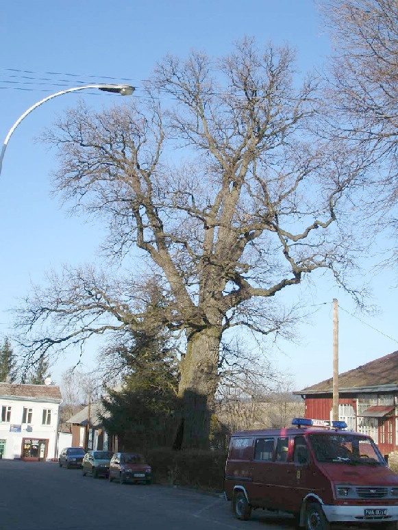 100-letni dąb w Birczy obok komendy policji